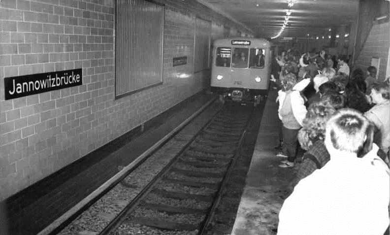 ADN-ZB-Roeske-11.11.89-Berlin: Zur Unterstützung des Reiseverkehrs nach Berlin (West) wurde der U-Bahnhof Jannowitzbrücke eröffnet. Zum Fahrpreis von 2.70 Mark können die Besucher entweder in Richtung Leinestraße (Kreuzberg) oder Paracelsus-Bad (Wedding) fahren.